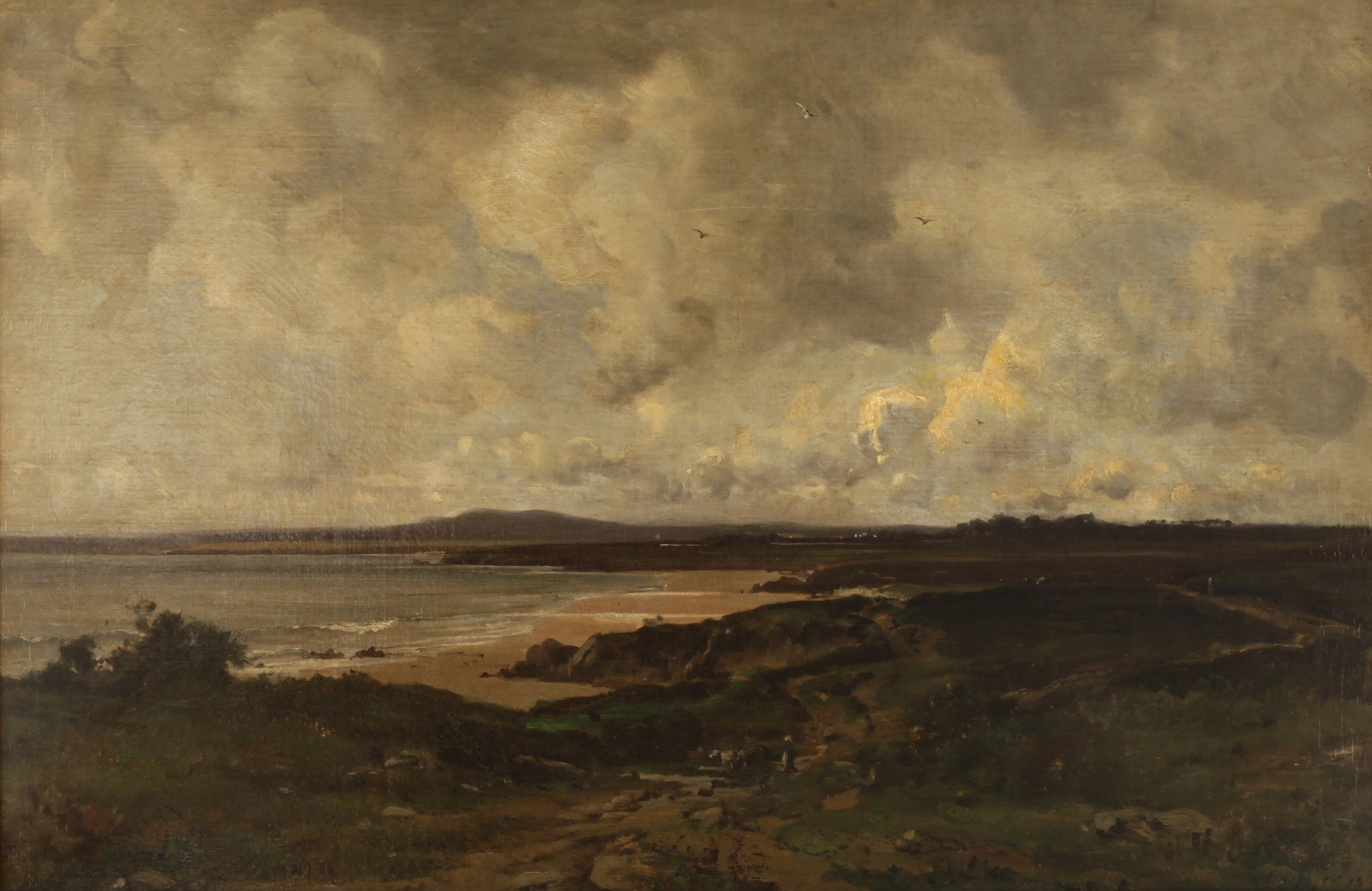 Paisaje (Orilla del mar)label QS:Les,"Paisaje (Orilla del mar)"